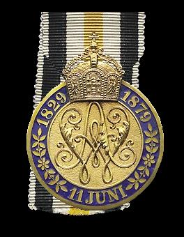 Eigen scan van een medaille in mijn verzameling. Het lint is niet authentiek maar de kleuren kloppen wel. Robert Prummel 4 aug 2006 00:51 (CEST)